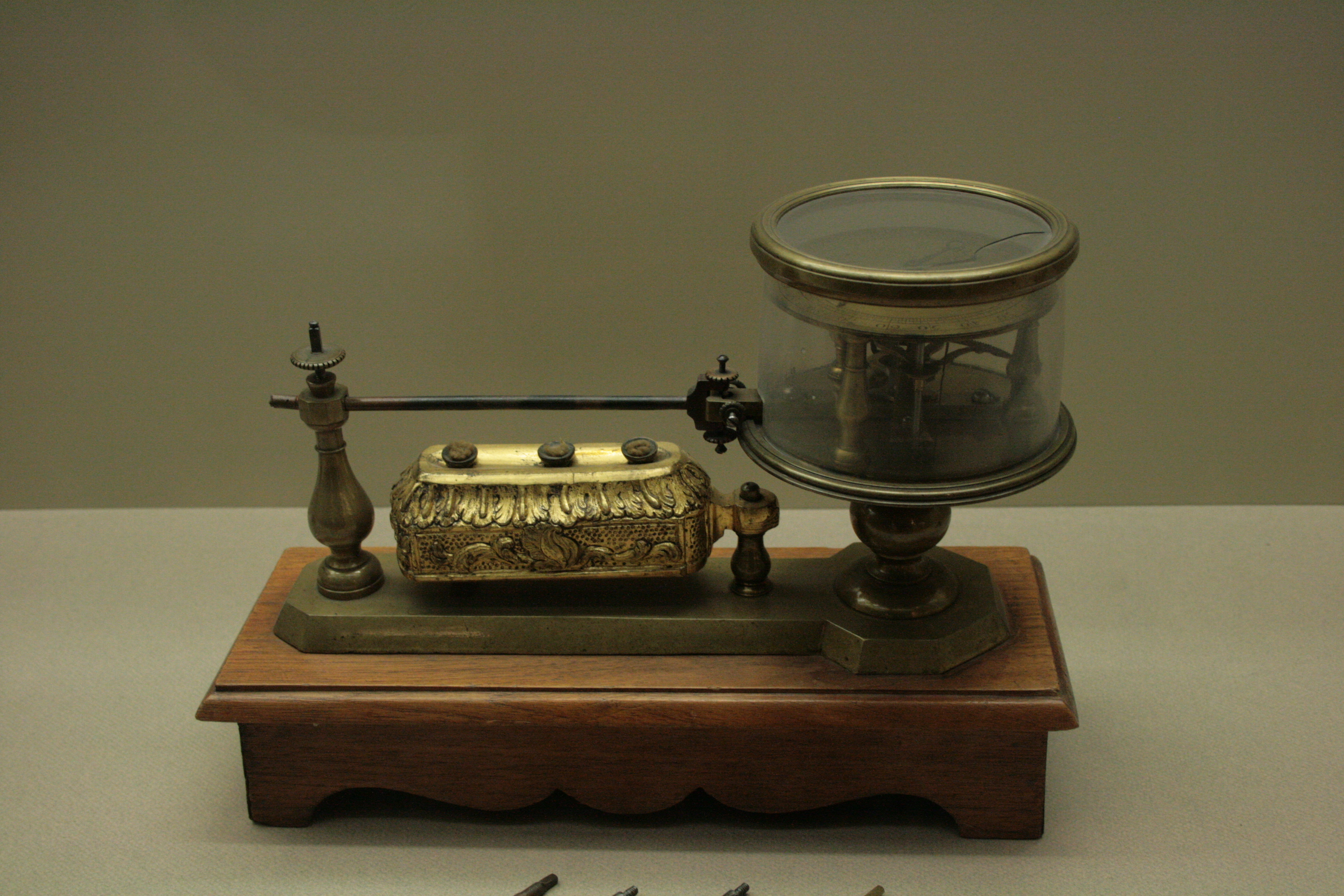 Dilatómetro - 1770 -1775